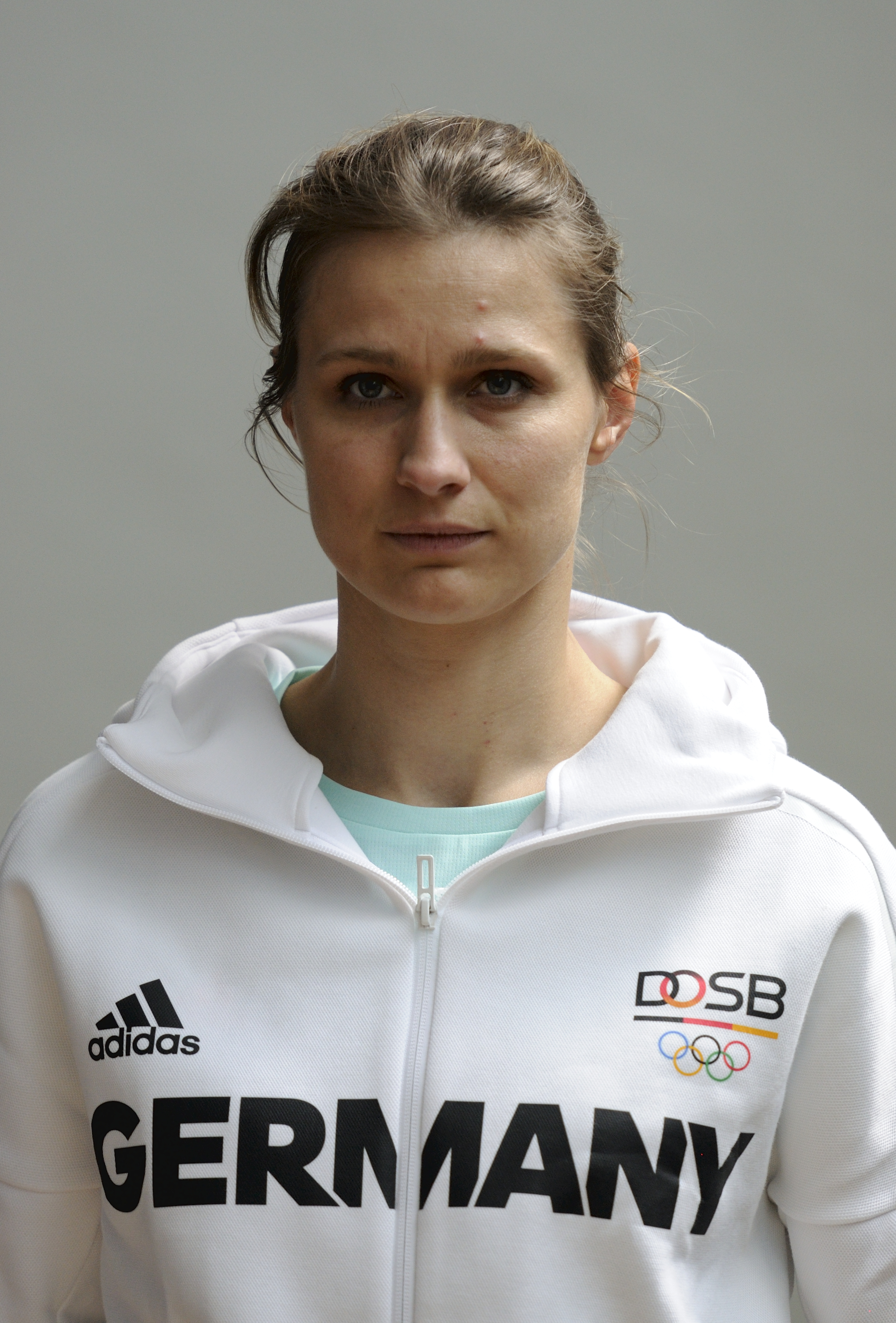 Bild aufgenommen in Hannover während der Einkleidung der deutschen Olympiamannschaft 2016. Britta Heidemann.